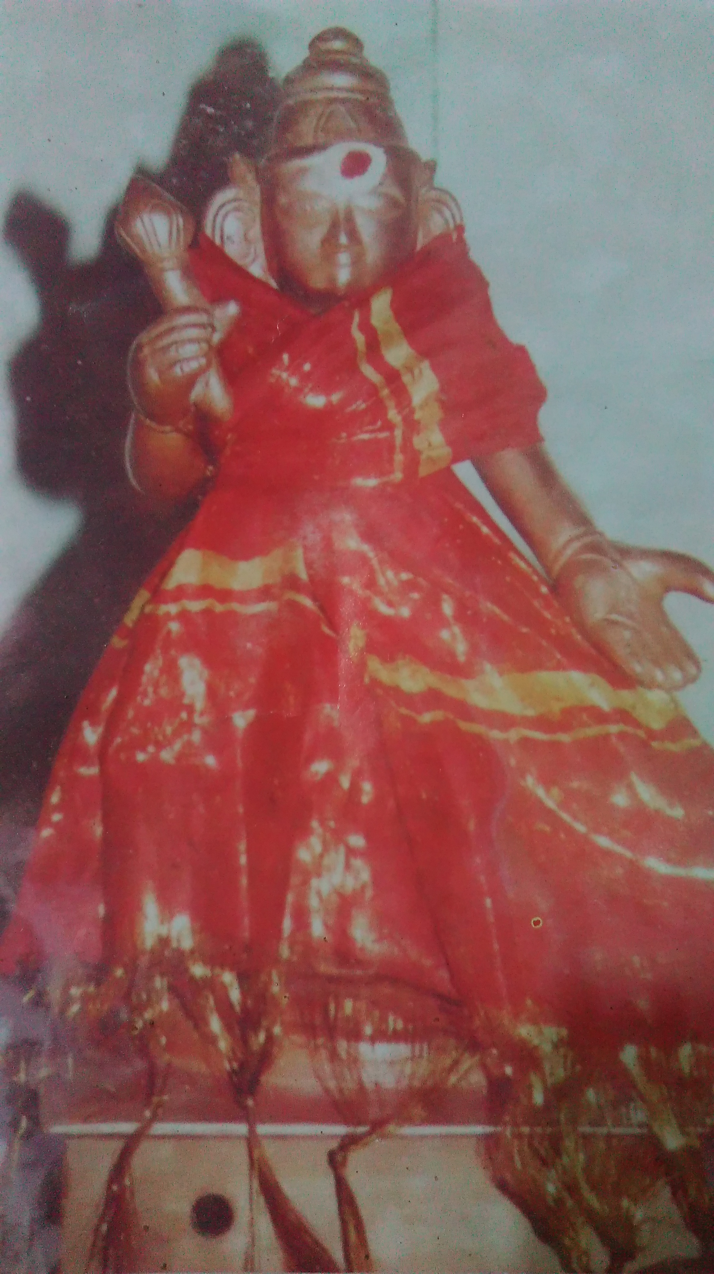 புராதன ஐம்பொன் விக்கிரகம்